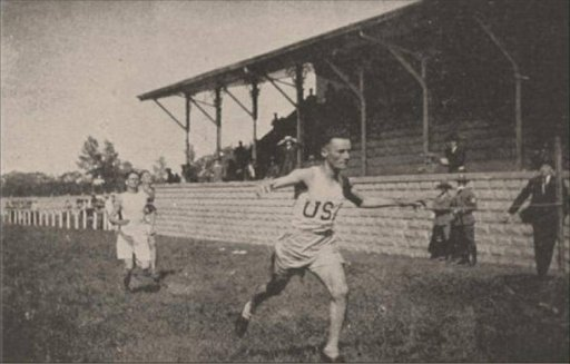 Centroamericana, Localización: San Jose. Costa Rica. Ceremonias: Apertura: 29 de diciembre de 1924 - Clausura :1 de enero de 1925